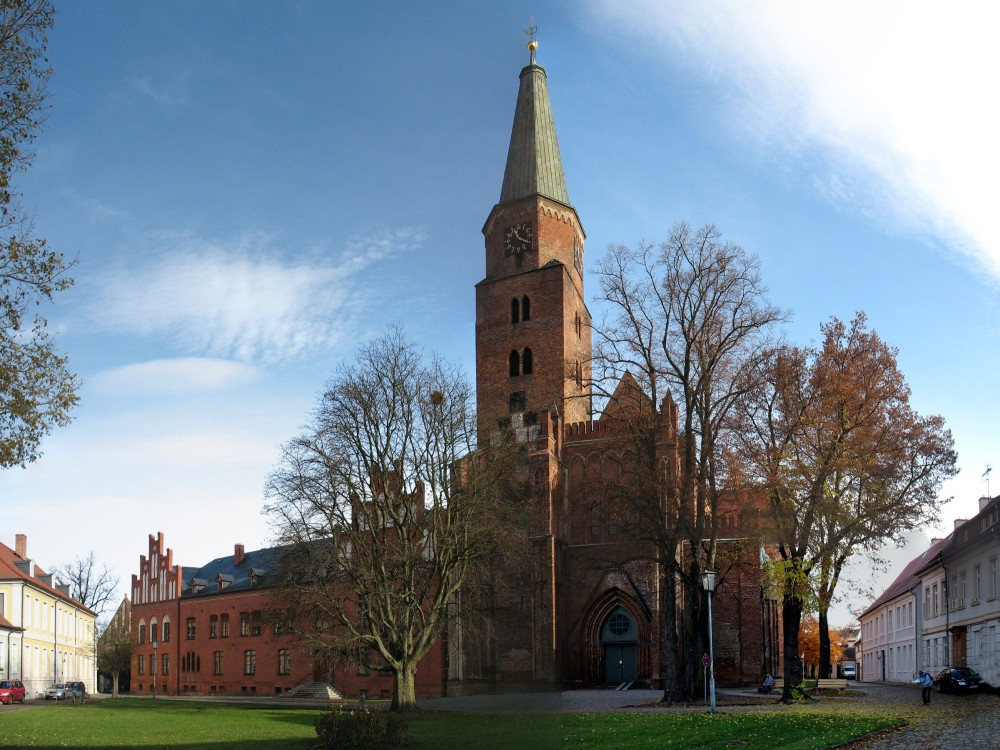 Der Dom St. Peter und Paul zu Brandenburg an der Havel